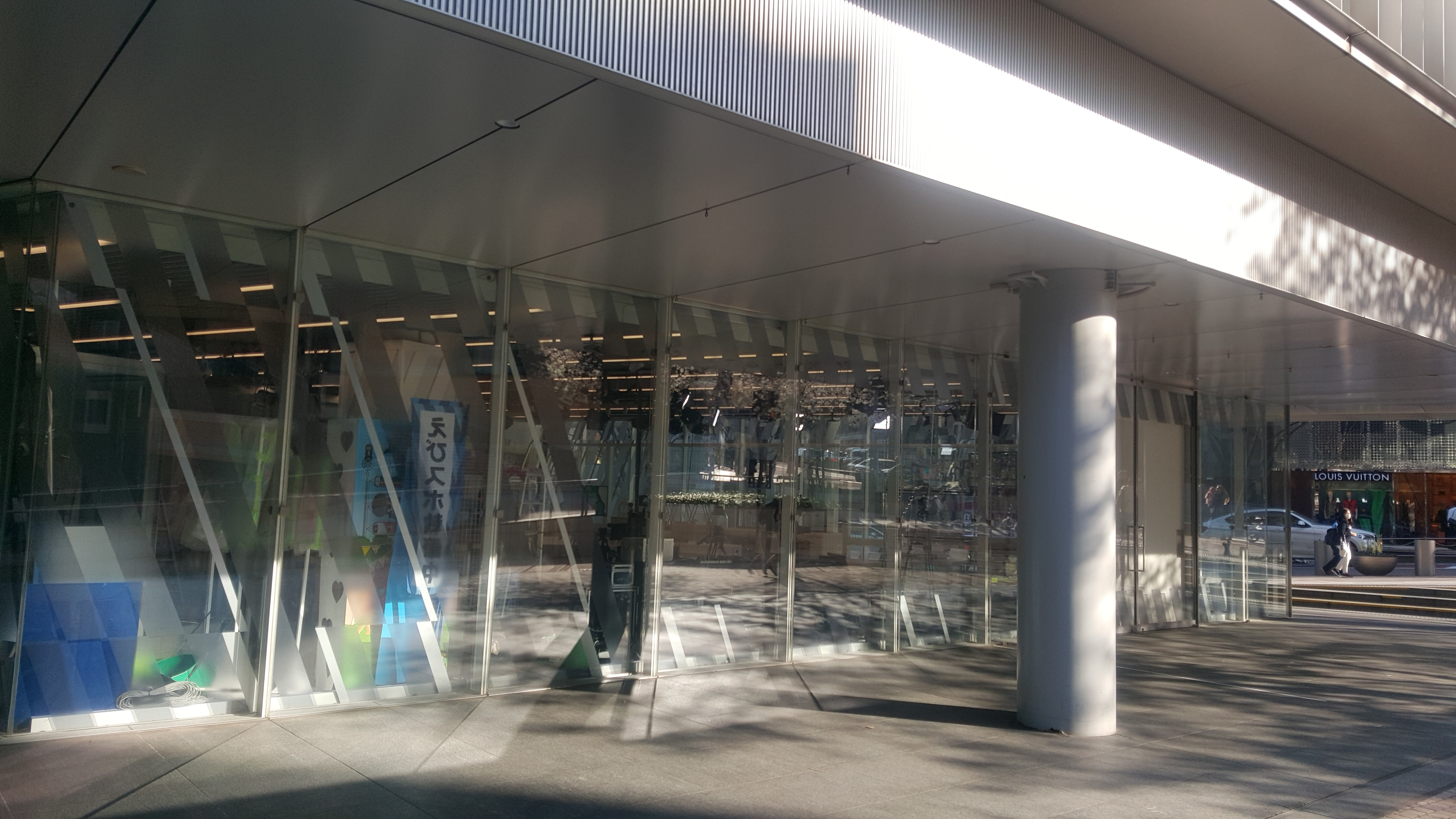 EX Keyakizaka studio